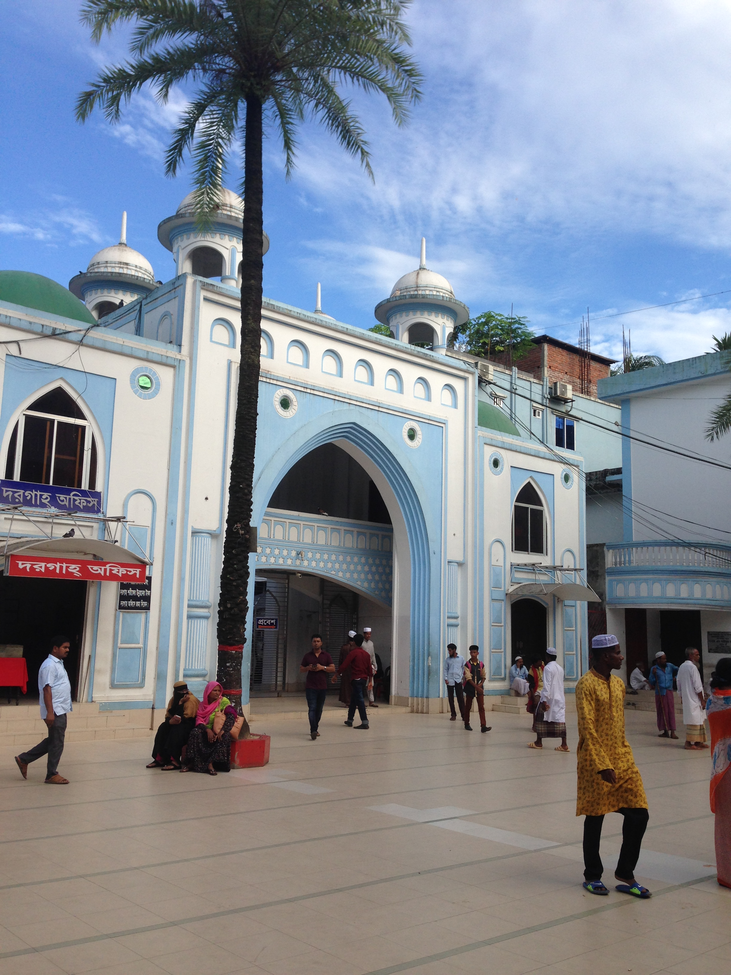 হযরত শাহজালালের দরগাহ